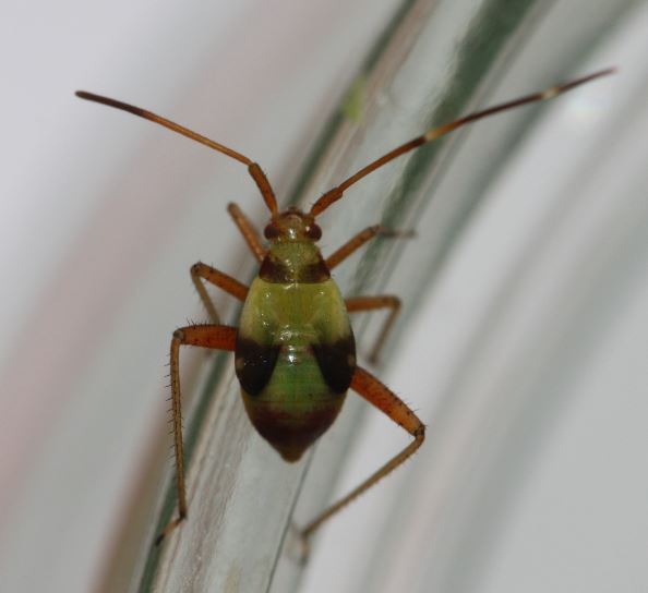 Nymphe von Adelphocoris reichelii, am 17.7.2017 in der Schwetzinger Hardt